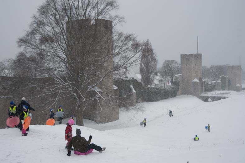 Pulkaåkning utanför ringmuren vid Norderport. Motiv: Visby ringmur Nyckelord: Riksintressen, Vintermotiv, Världsarv Kategori: Stadsvall/stadsmur Pulkaåkning utanför ringmuren vid Norderport.